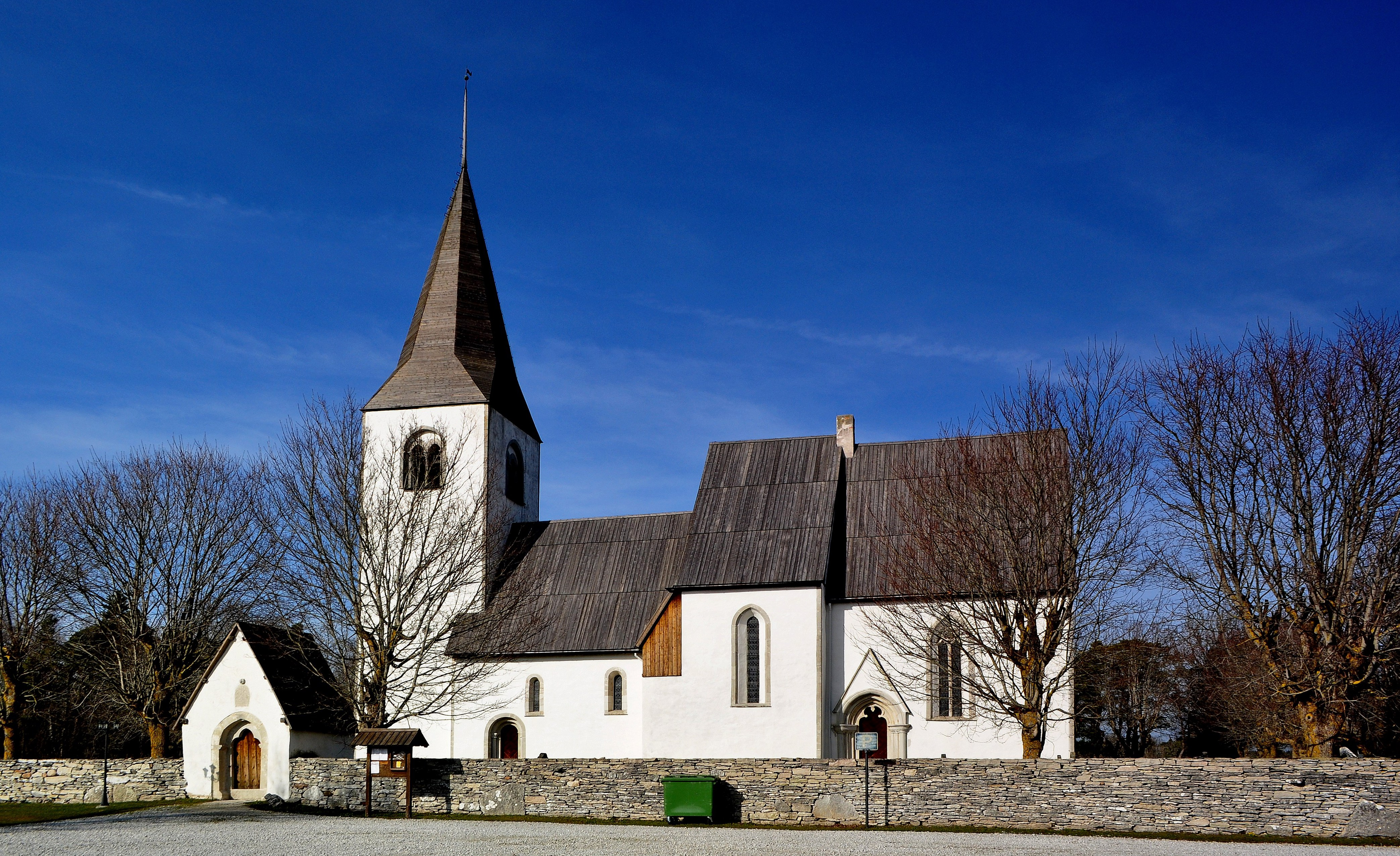 Vallstena kyrka i Vallstena socken på Gotland.